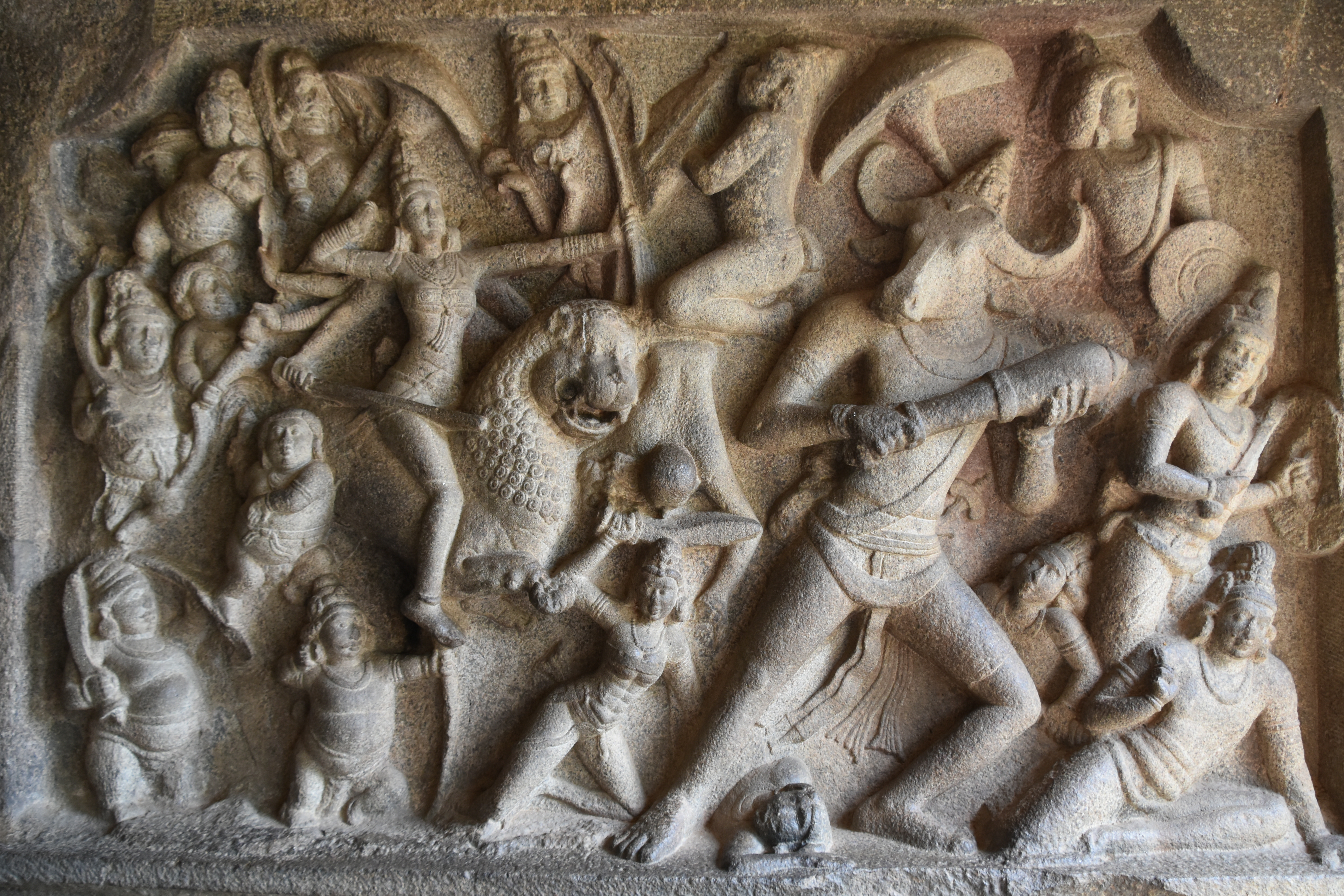 Mahishasuramardini Cave Temple, also called Mahishamardini mandapam Mahabalipuram, Mamallapuram, Tamil Nadu 2017